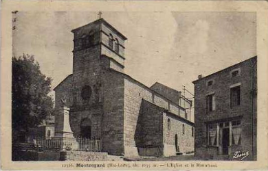 montregard 2